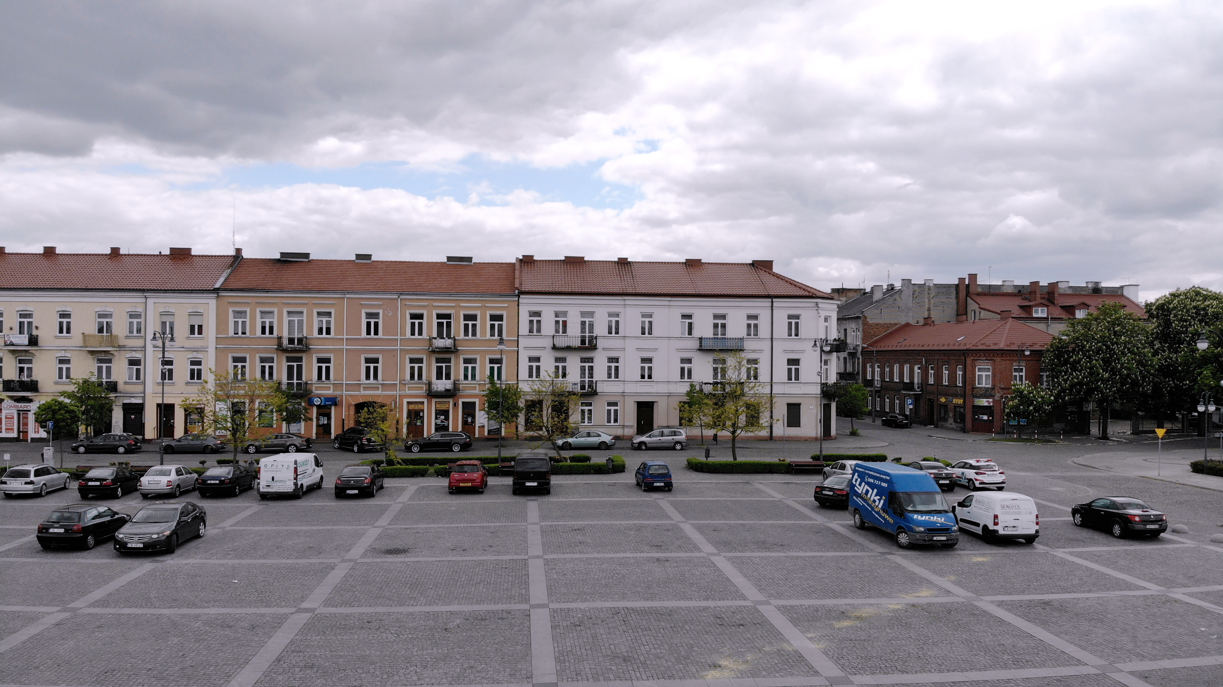 Zielony Rynek (2020 r.)